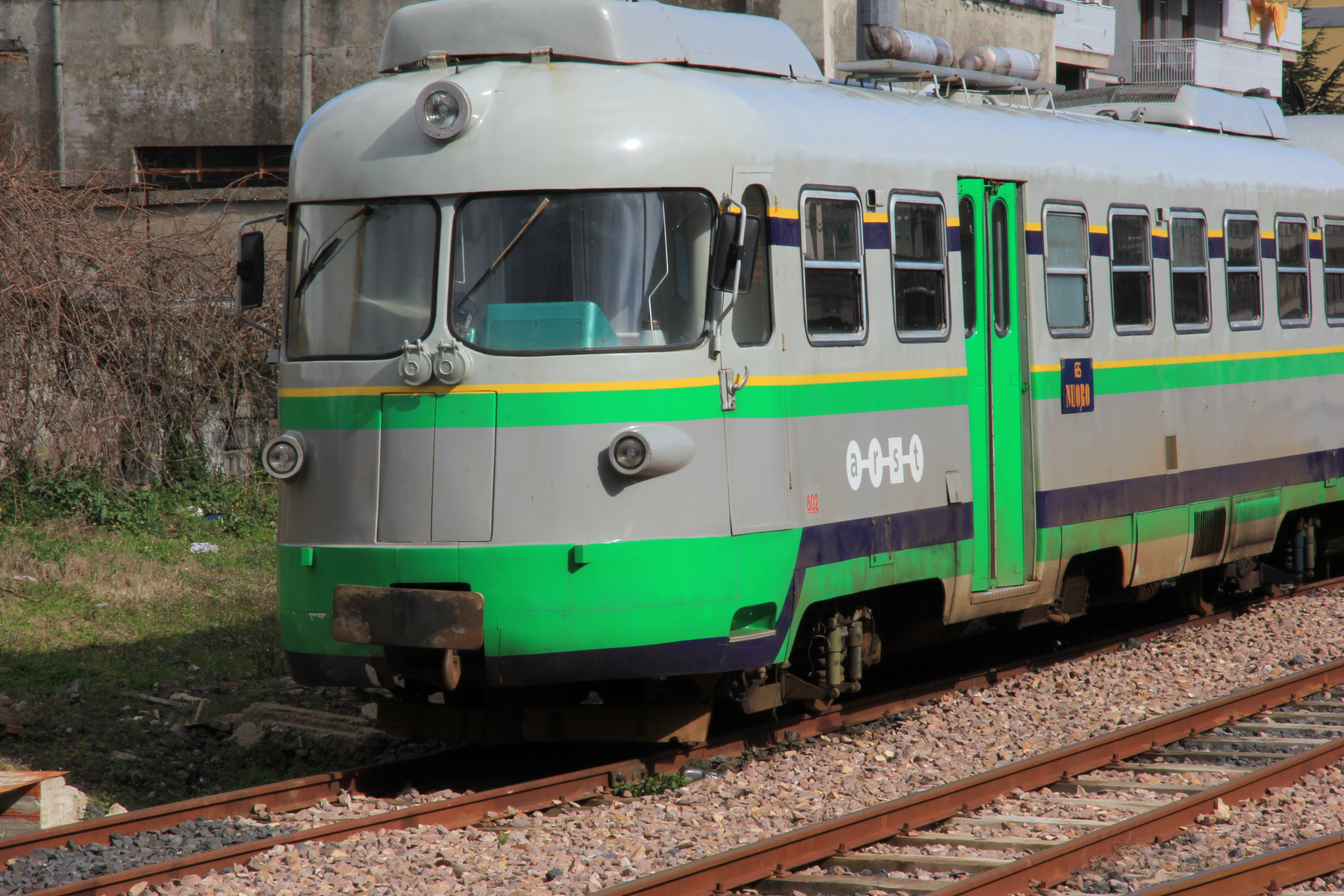 Macomer - Stazione ferroviaria ARST